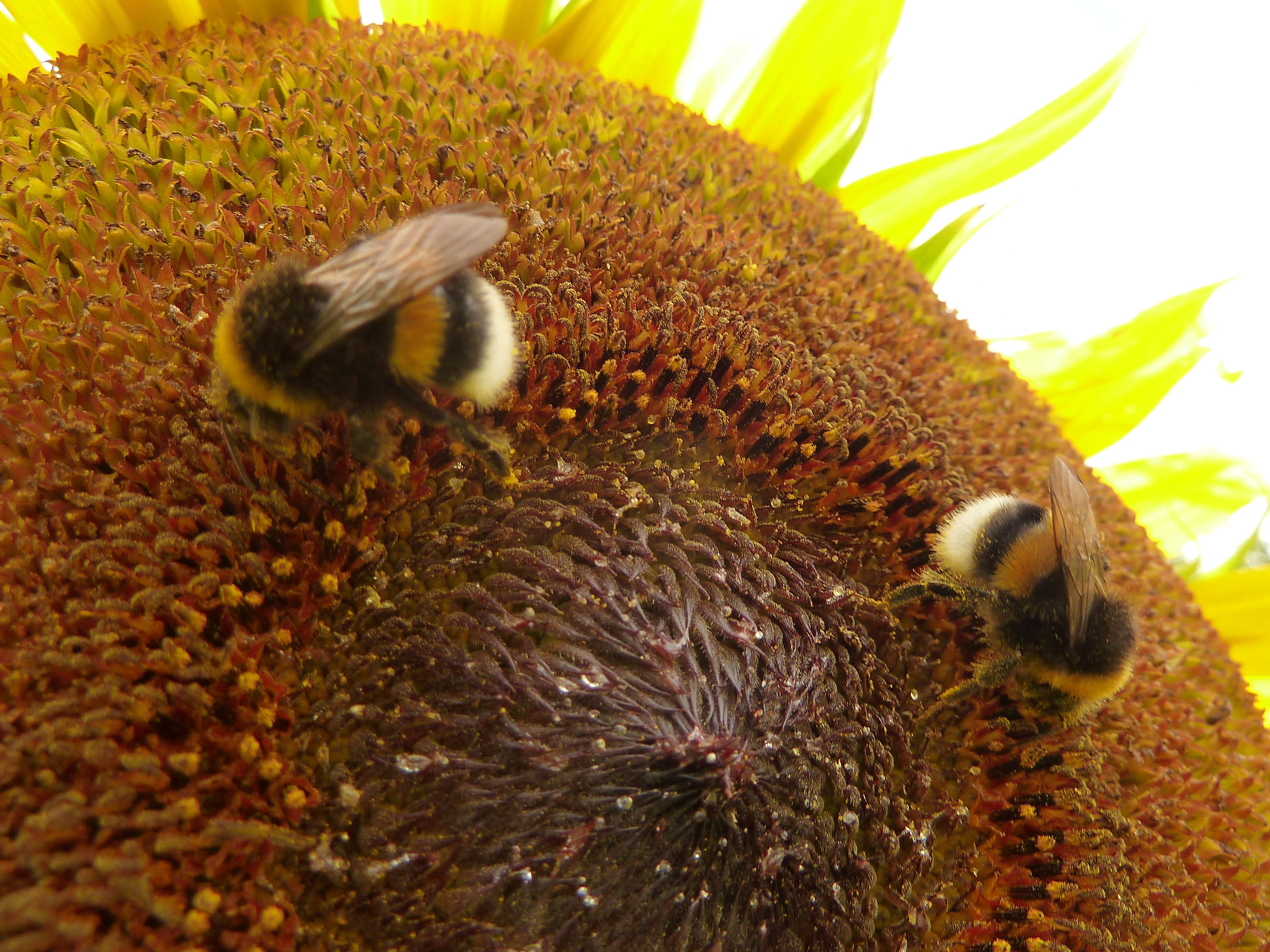 Čmrlja